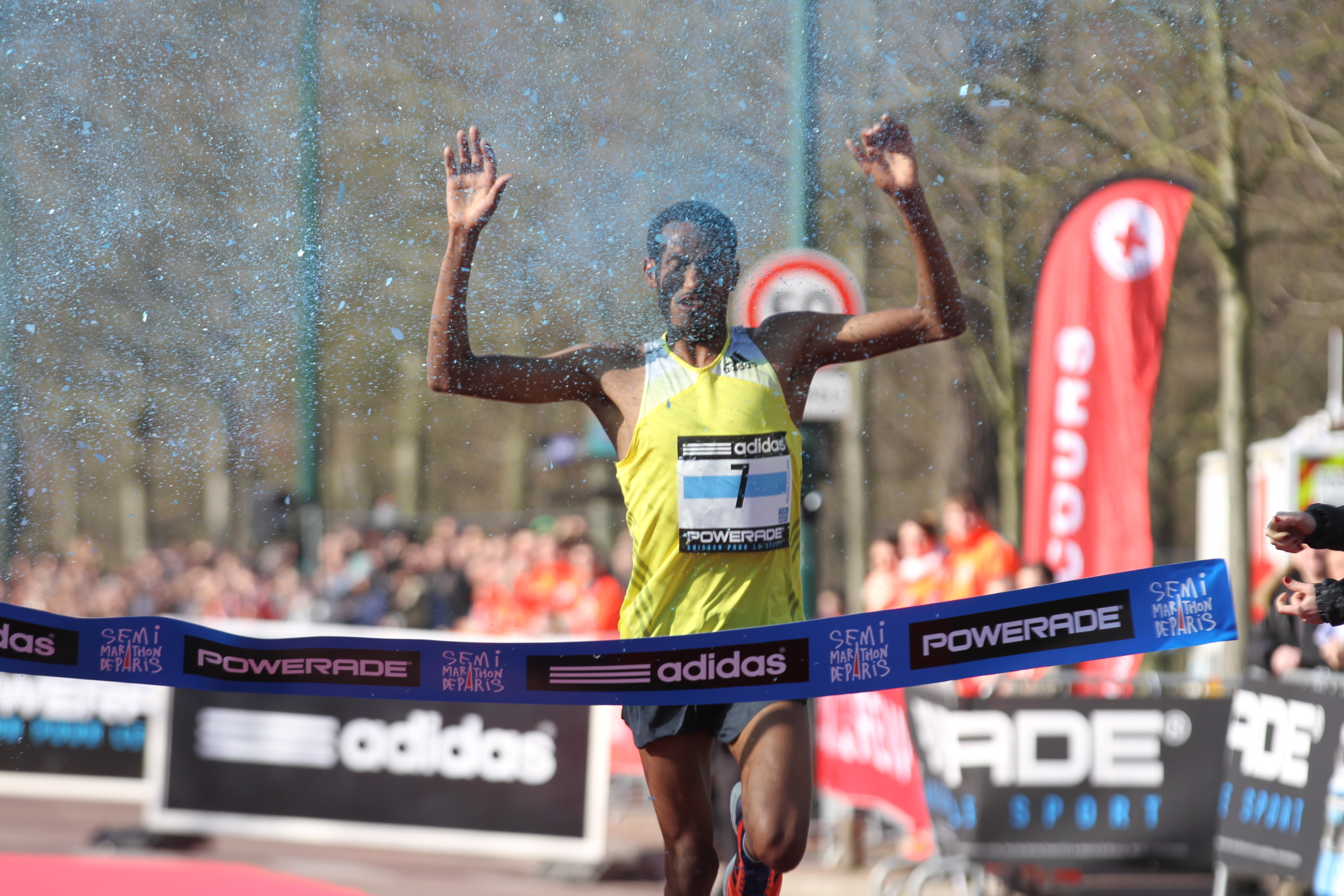 Mulle Wasihun remportant le semi-marathon de Paris 2014.